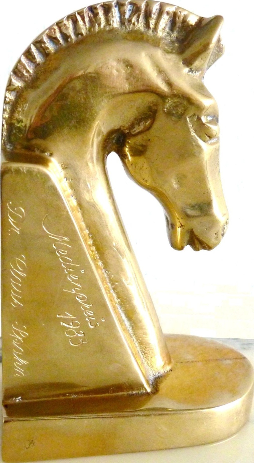 Schach Medienpreis 1983, Ehrung von Claus Spahn durch Deutschen Schachbund 1983.